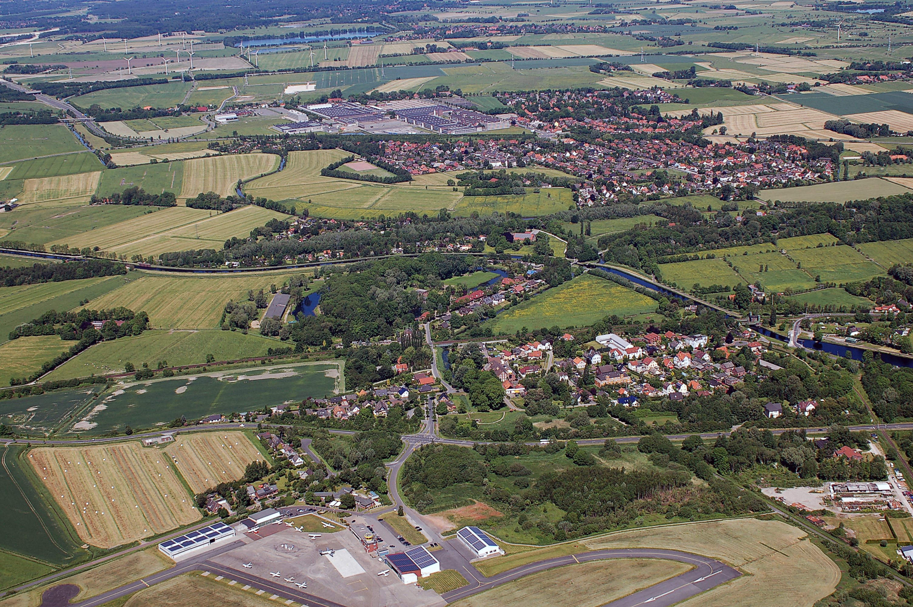 Luftbilder von der Nordseeküste 2012-05